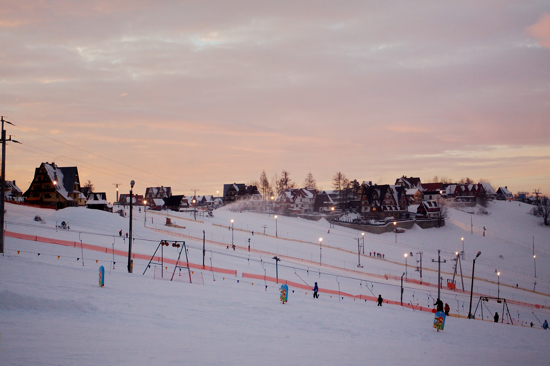 Wyciągi Bukowiny Tatrzańskiej